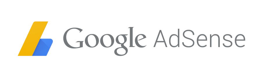 Google adsense logo